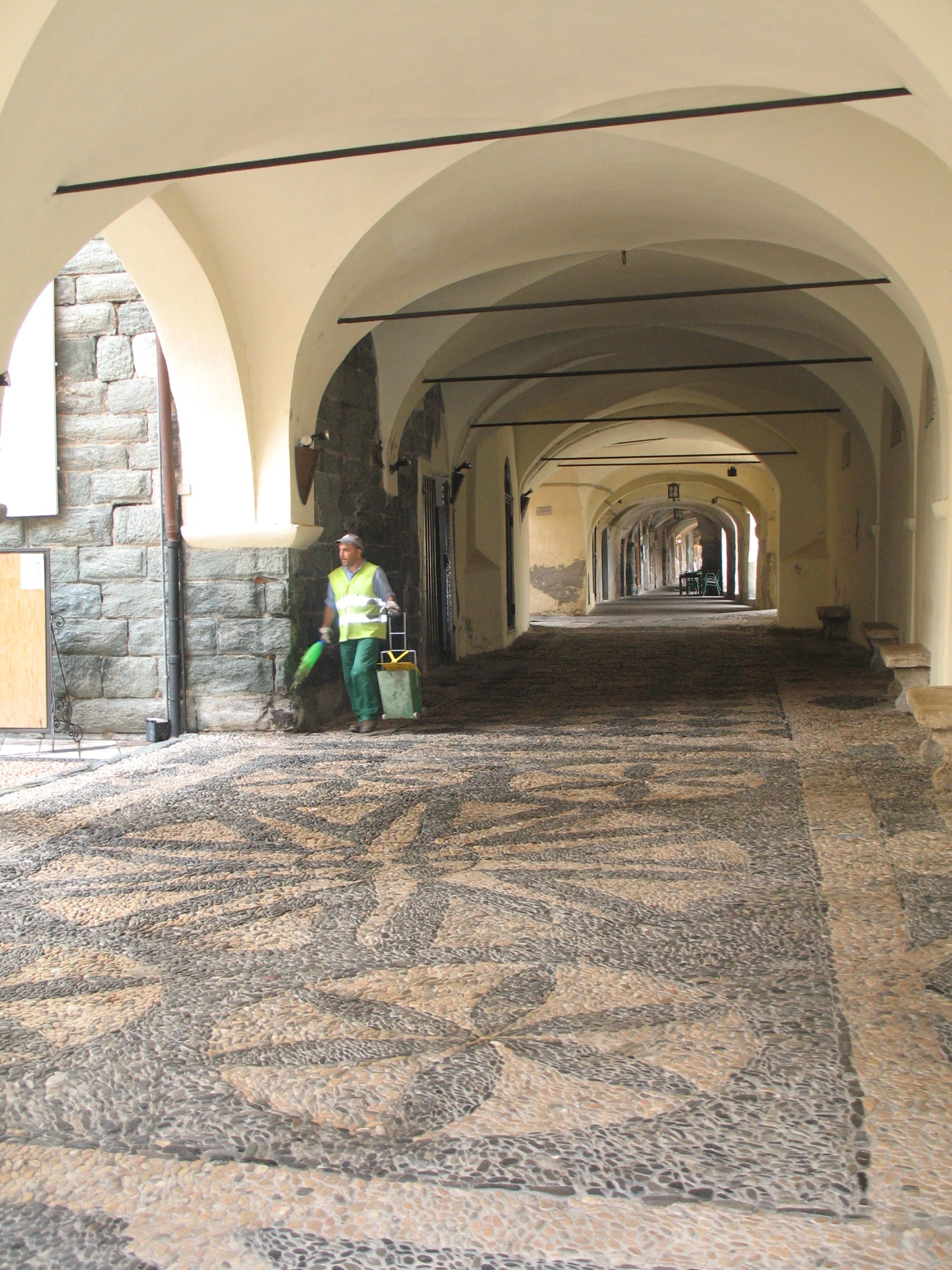 Serie di Immagini da Noli in provincia di Savona